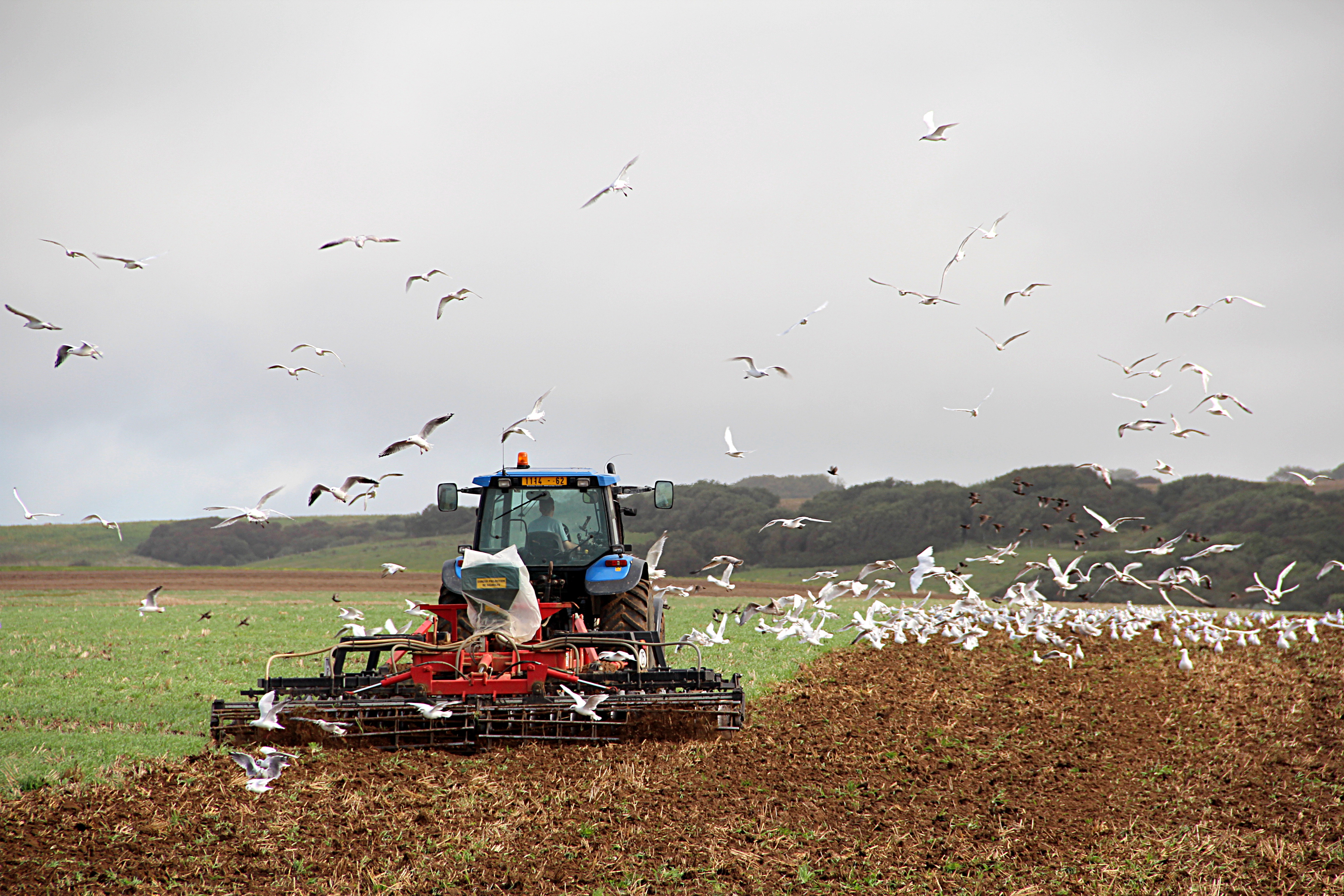 Audresselles (Pas-de-Calais) – Déchaumage d’un champ situé au nord-est du village.